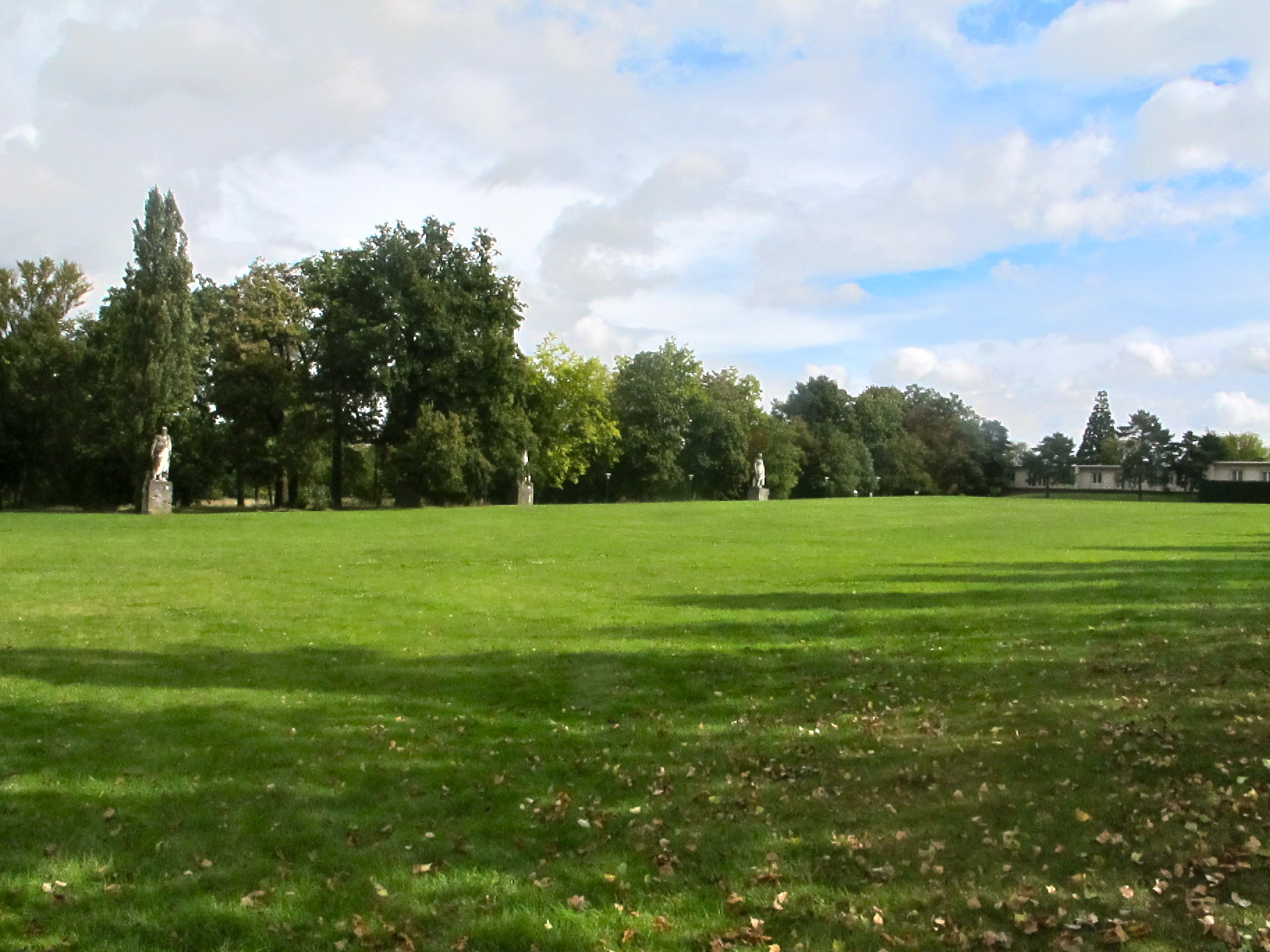 Marchfeld (grande étendue d'herbe) situé au lycée militaire de Saint-Cyr.